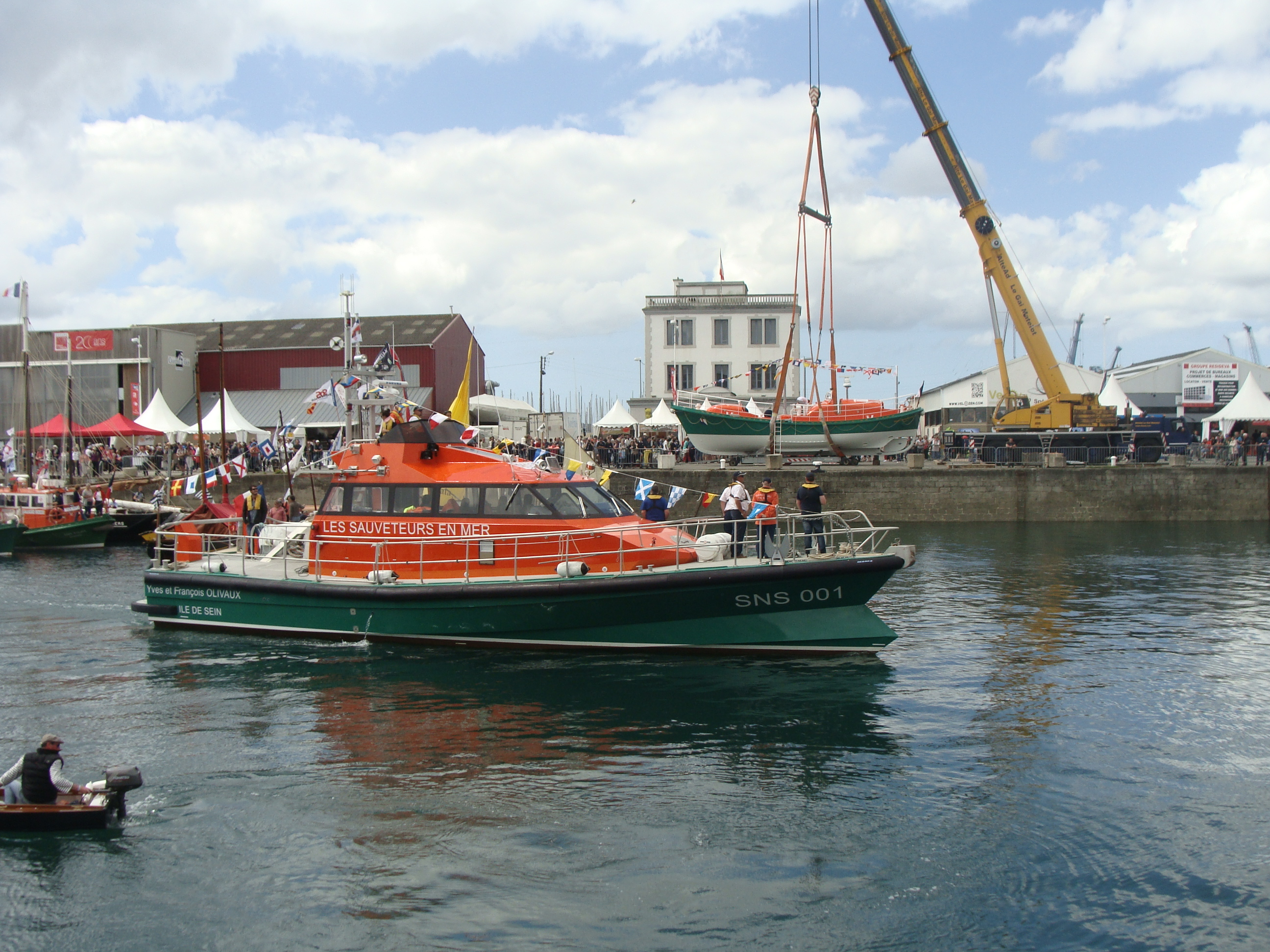 Canot de sauvetage de l'Île de Sein, présent sur Brest 2016 lors de la remise à l'eau du canot Patron François Morin (de côté)